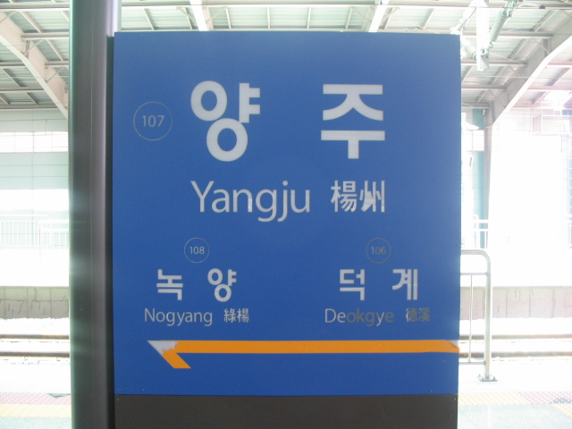 경원선 양주역 역명판